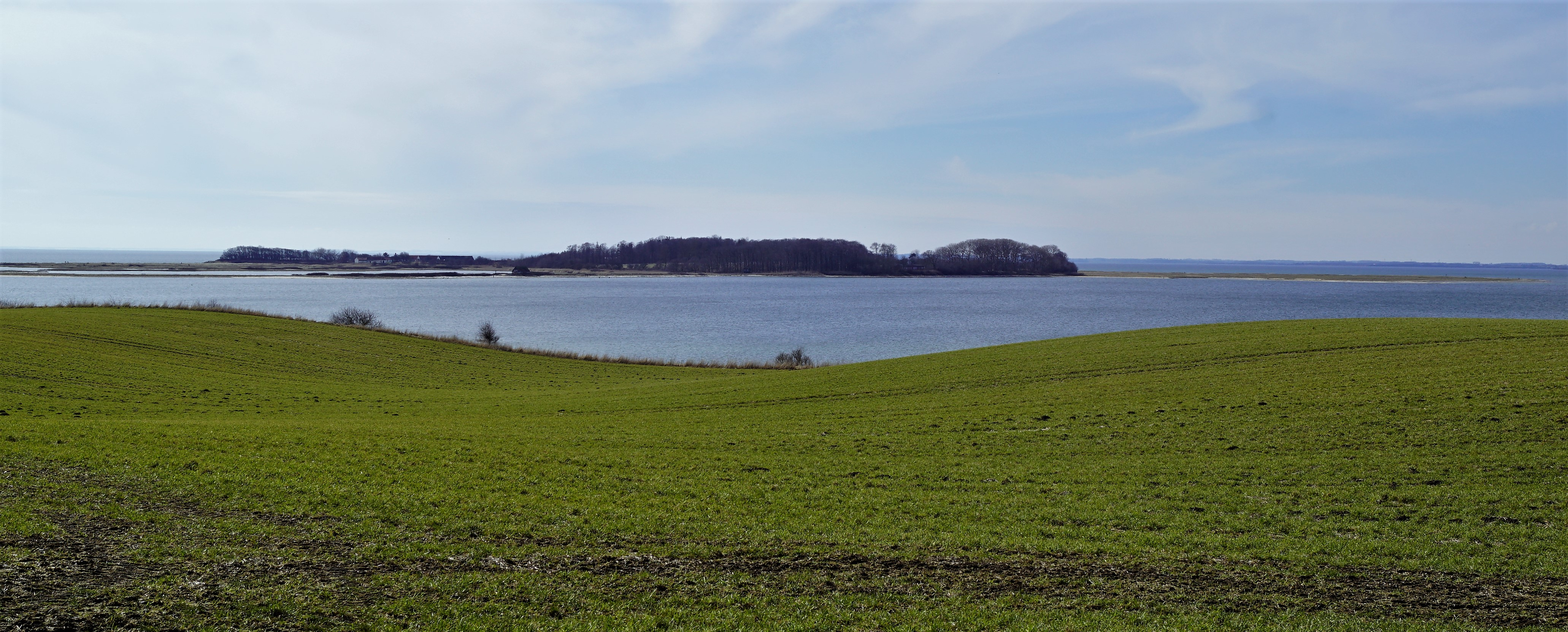 Torø set fra øst